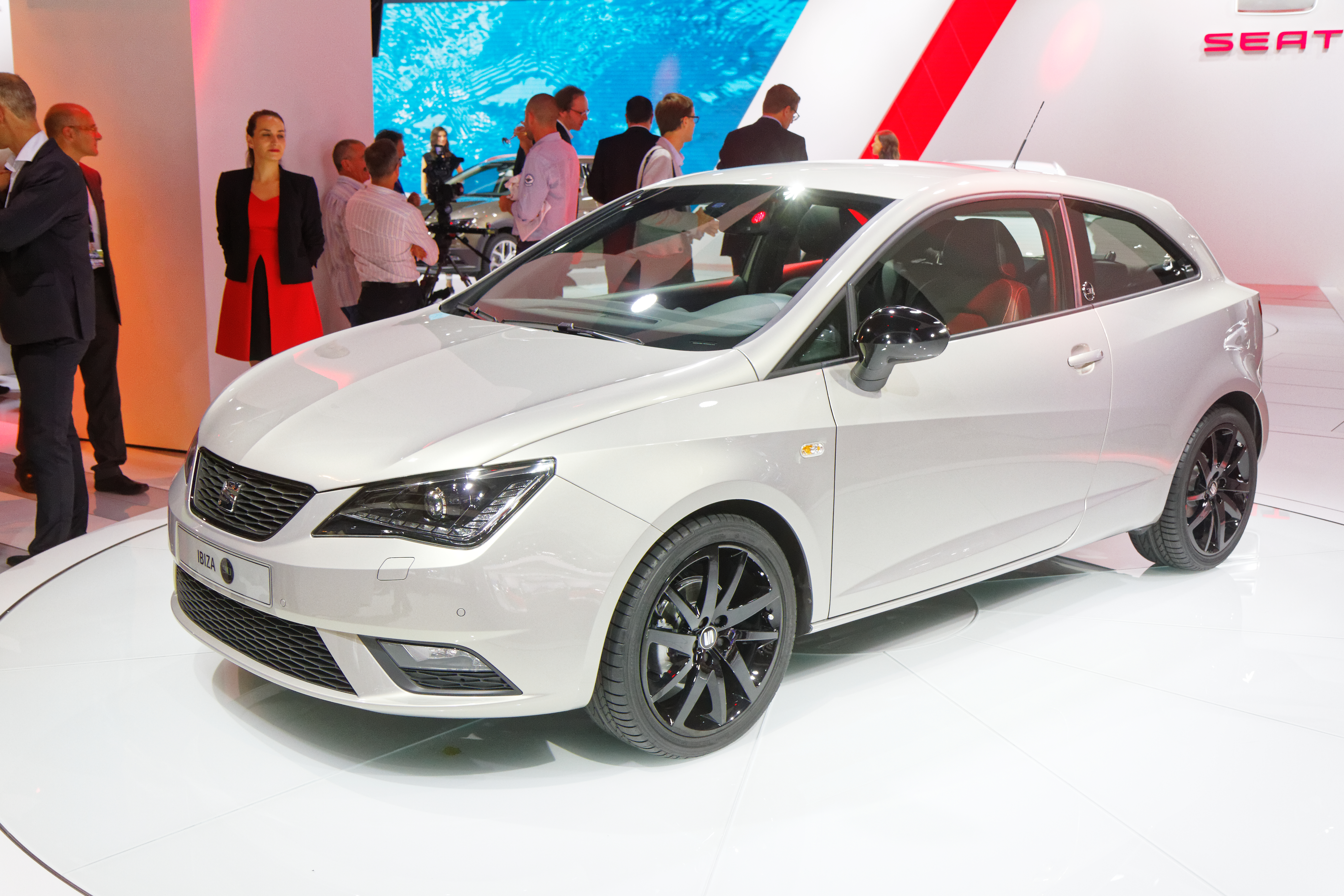 Une Seat Ibiza présentée lors du mondial de l'automobile de Paris 2014.